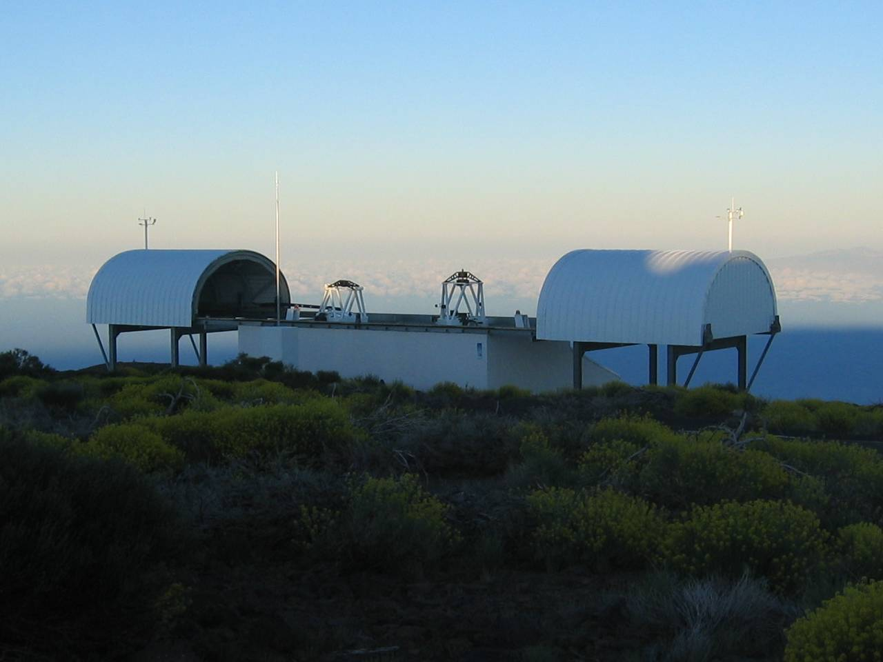 Robotisches Observatorium STELLA auf Teneriffa, Leibniz-Institut für Astrophysik Potsdam